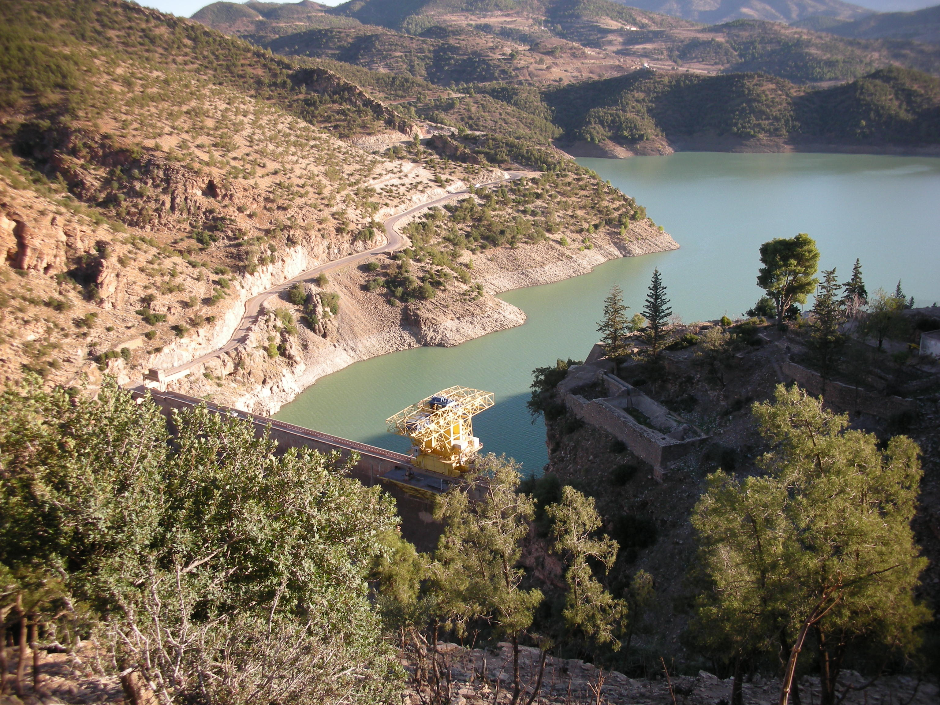 Construit entre 1926 et 1932 pour le compte du Service Centrale des Irrigations en Algérie, le barrage de l’Oued-Fodda est un barrage-poids en béton, mesurant 100 m de hauteur, 65 m d’épaisseur à la base et 182 m de longueur de crête. Sa construction et celle des ouvrages annexes ont nécessité l’exécution de 320.000 m3 de béton.